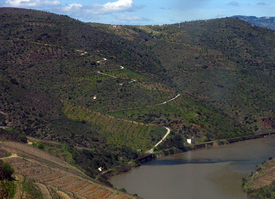 Peço desculpa pela má qualidade mas esta é a única foto que tenho onde se pode ver a estrada na integra: em todas as outras embora estejam melhores a estrada aparece cortada. Aqui podem ver A descida para o infer... err... para a foz e a antiga estação do Côa, no troço desactivado da linha do Douro